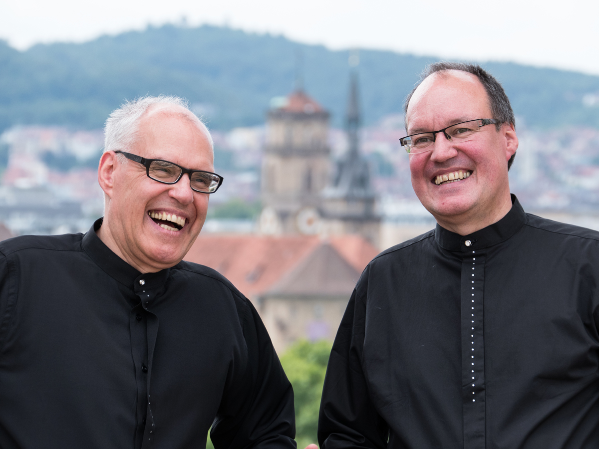 Hans-Peter Stenzl und Volker Stenzl auf dem Turm der Musikhochschule Stuttgart